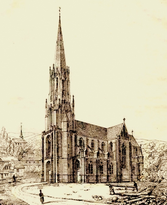 Lithografie der St. Josefskirche in Eupen-Unterstadt kurz nach der Fertigstellung um 1870